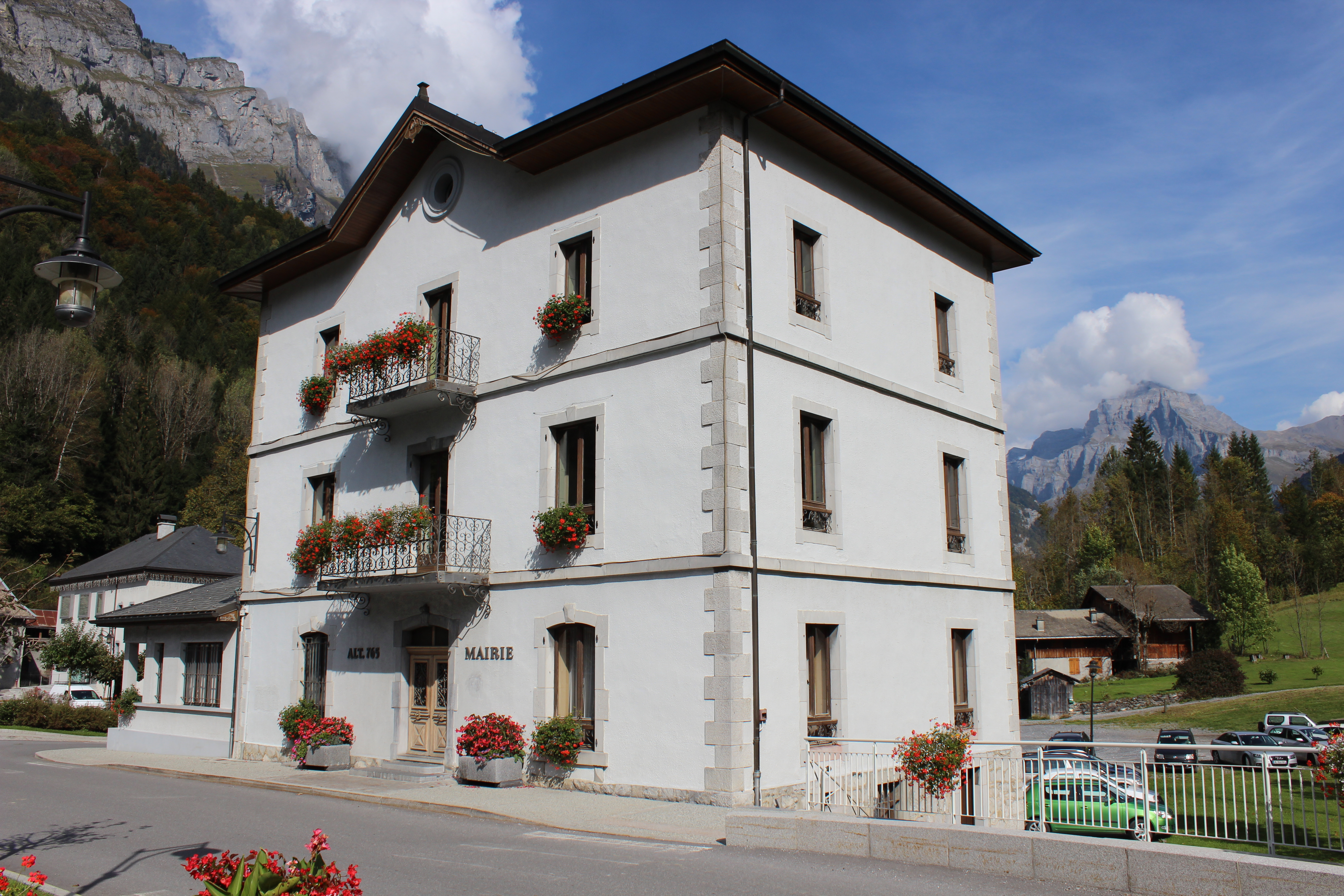 Sixt-Fer-à-Cheval.